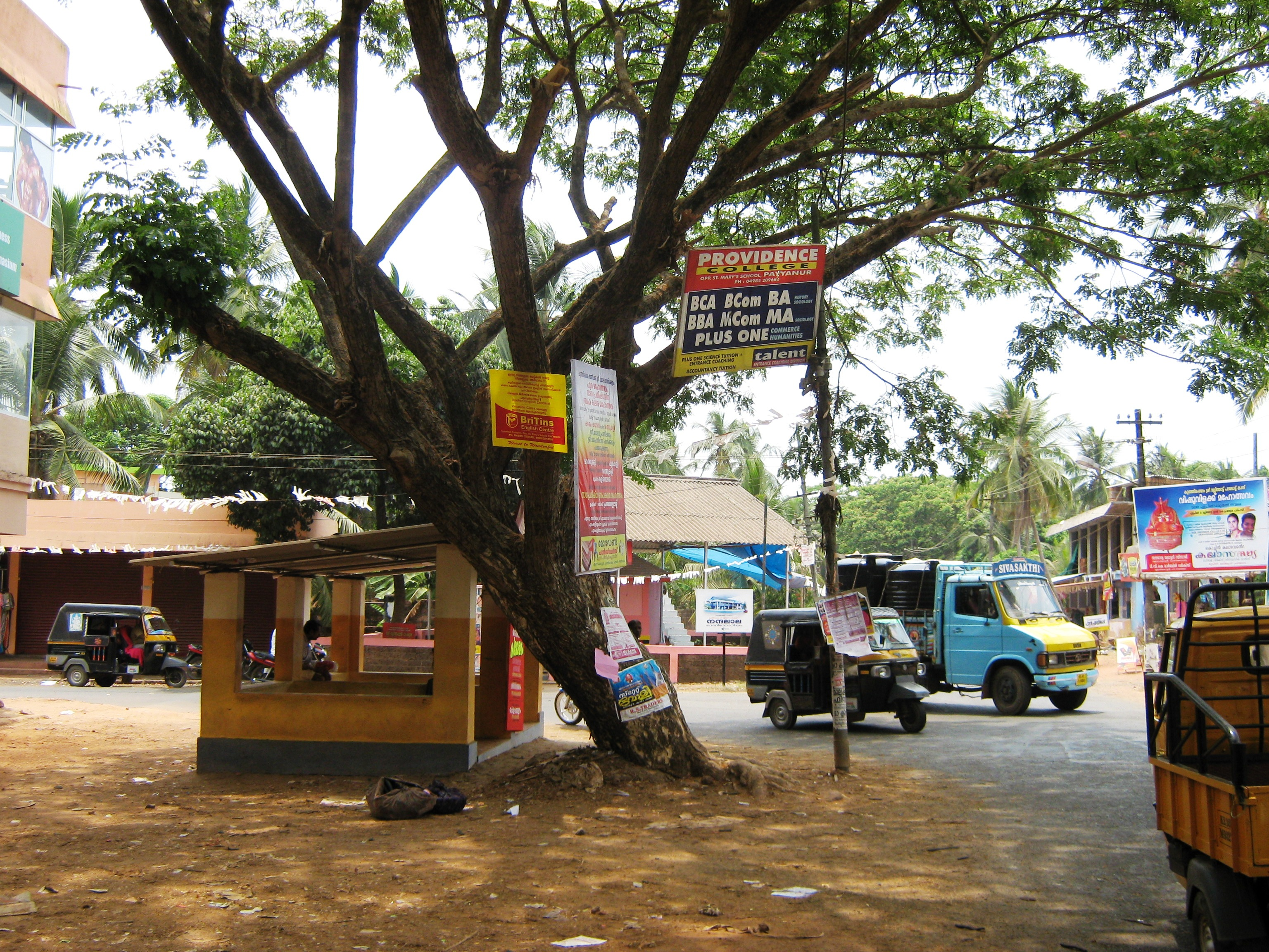 Payyannur, Kerala, India.